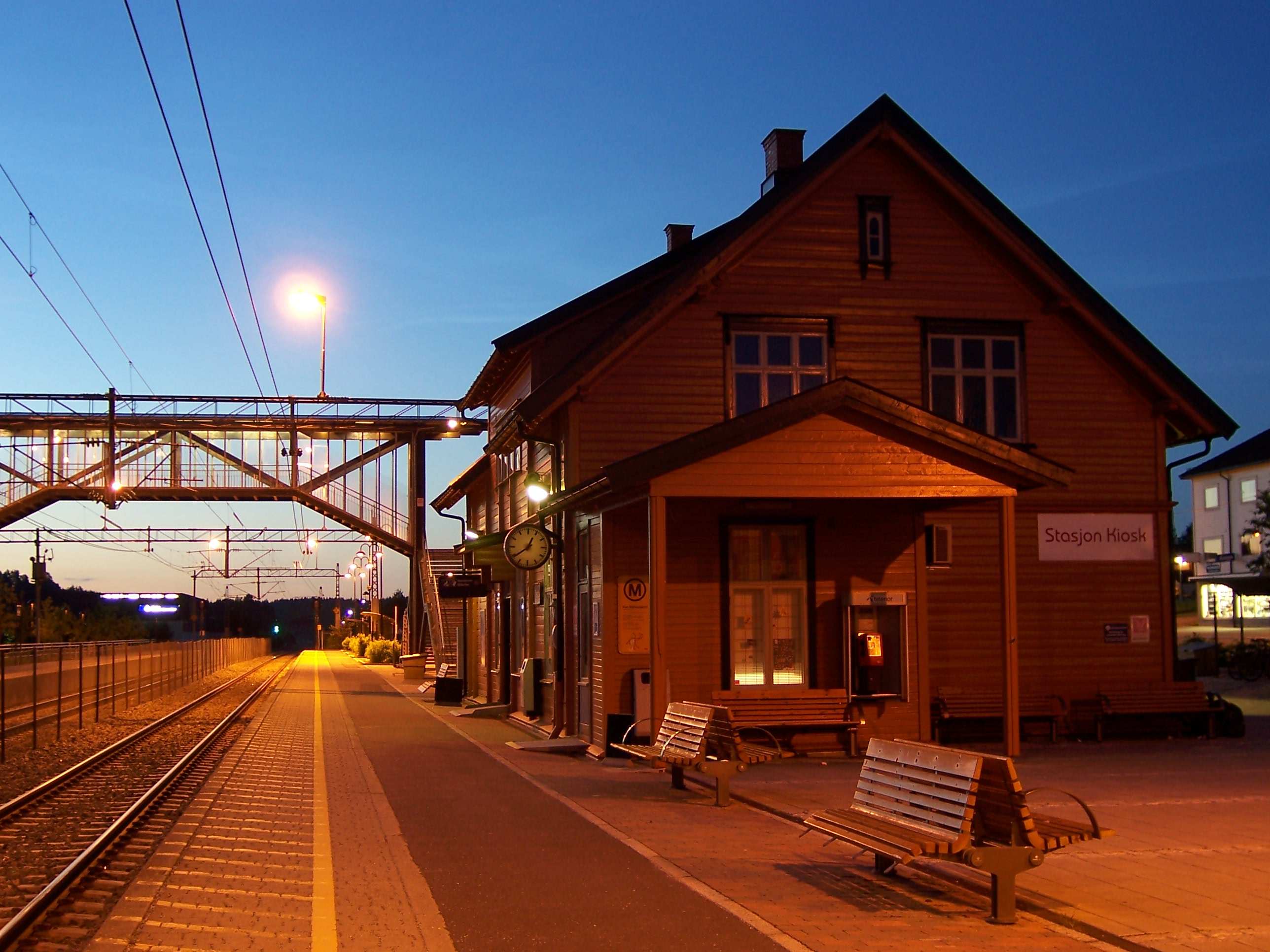 Vestby stasjon nattestid